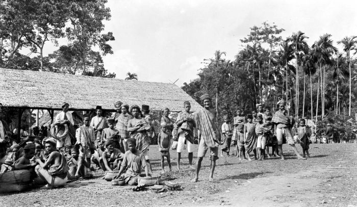 Negatief. Kleine pasar bij Loka in het gebergte, ten noorden van Bonthain, Zuid-Celebes